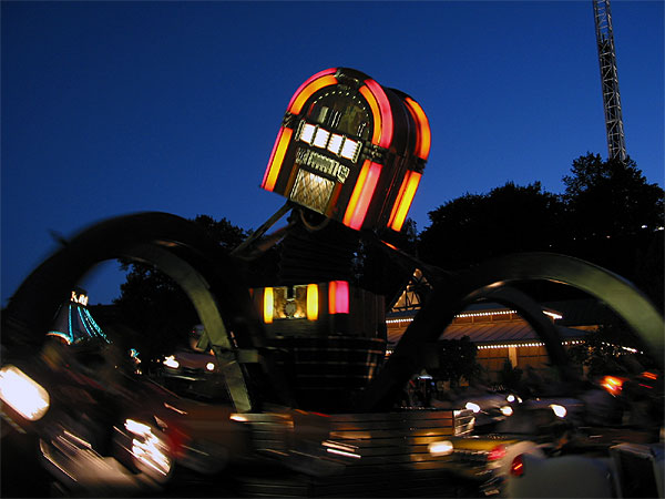 Jukebox Carousel at Lisberg, Göteborg, Sweden.